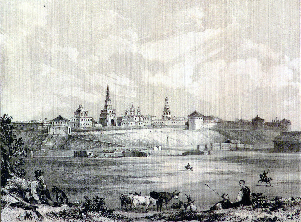 Казанская крепость. Из альбома: Виды Казани, рисованные с натуры Эдвардом Турнерелли. — Лондон, 1839.